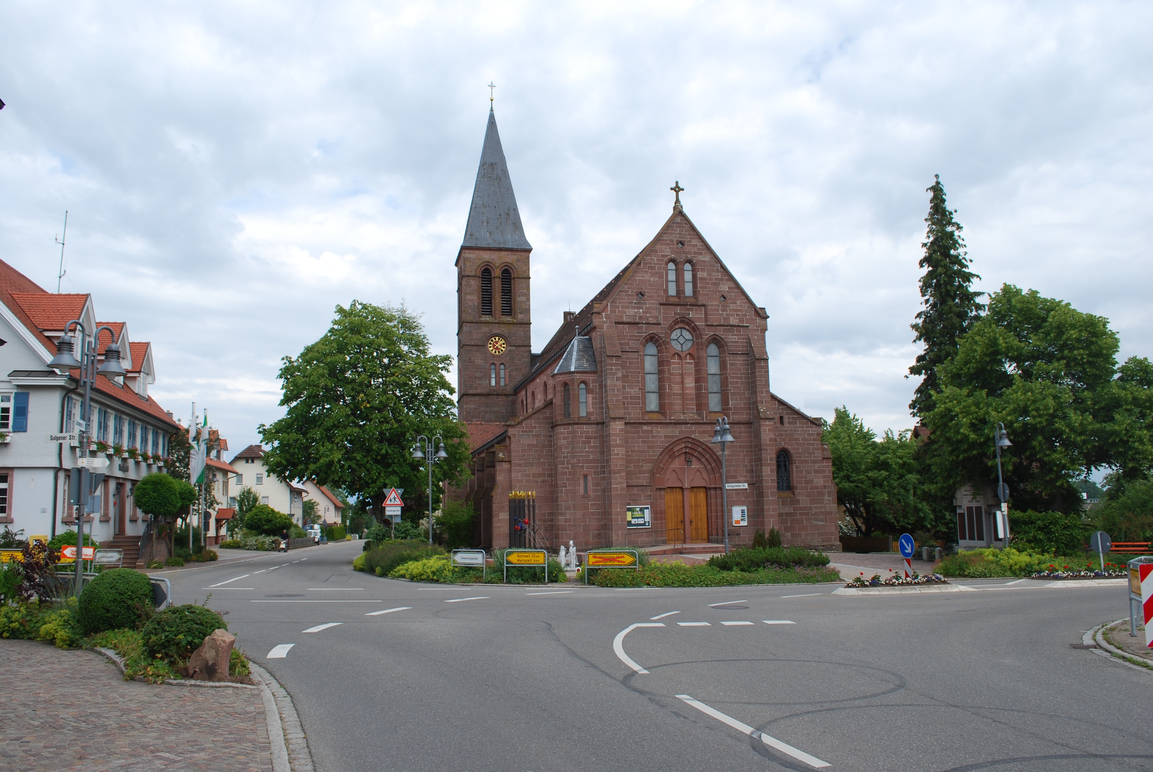 Katholische Pfarrkirche St. Georg in Hardt im Schwarzwald